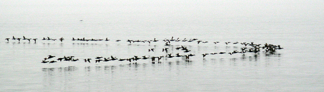 En flock Ejder i typisk formation sträckar väst tidigt en disig morgon vid Världens ände/Ystad. När det är vidstilla, som på bilden, går det fort, 85-90 km.